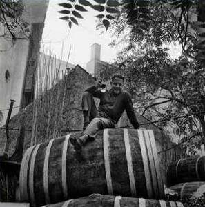 Ο Λώρενς Ντάρρελ υπήρξε μια αμφιλεγόμενη προσωπικότητα που πέρασε τη ζωή του ταξιδεύοντας και διατηρώντας μια στενή σχέση με την Αλεξάνδρεια, το Κάιρο, την Ελλάδα και την Κύπρο. Από τα σημαντικότερα βιβλία του υπήρξε το «Αλεξανδρινό Κουαρτέτο», που του χάρισε παγκόσμια φήμη.